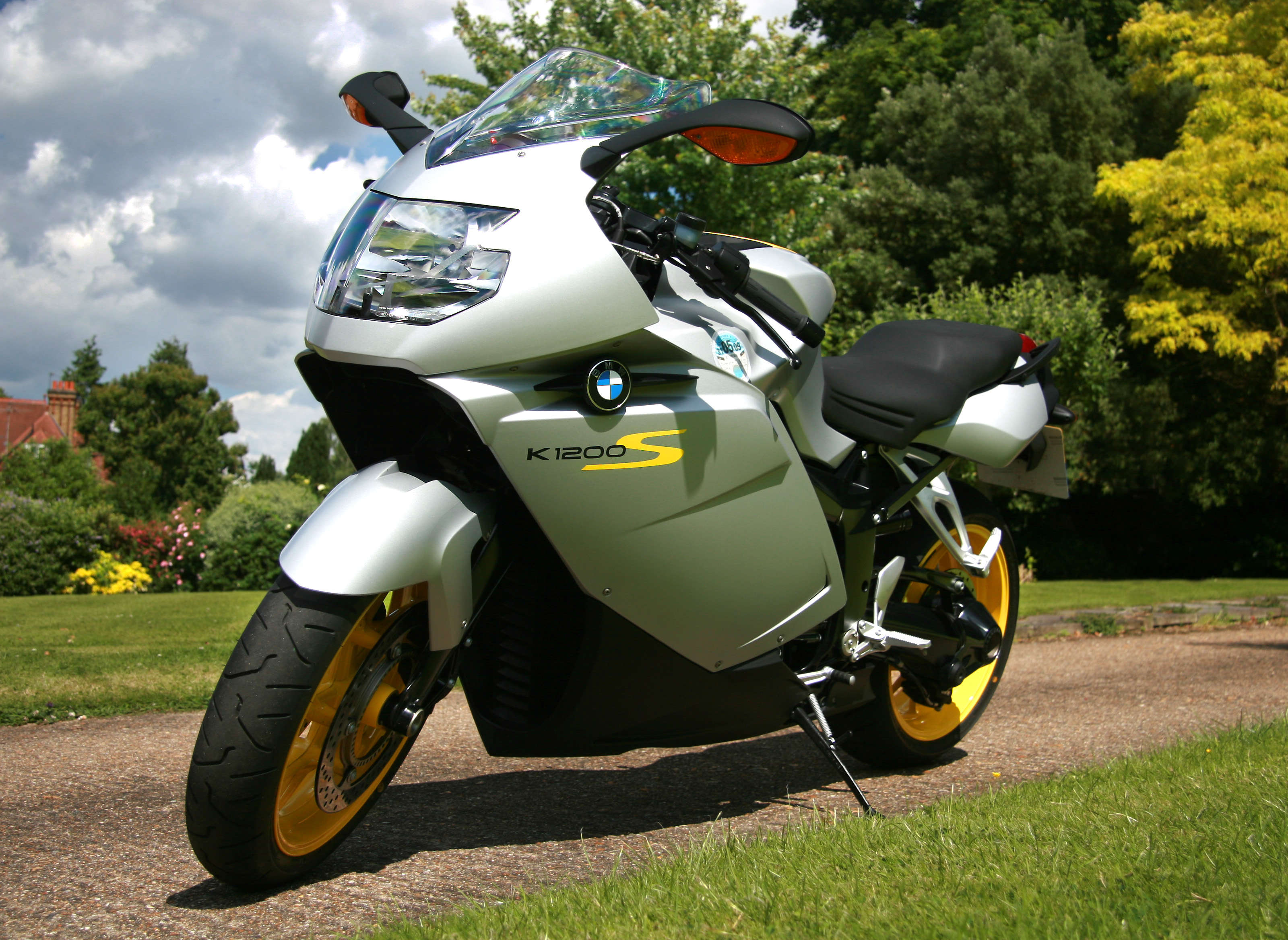 BMW K1200S motorcycle